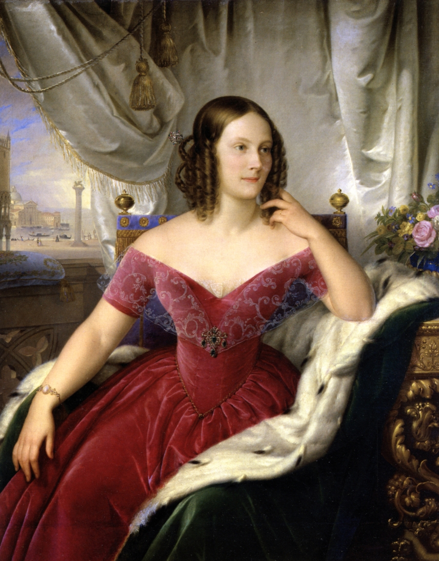 Granduchessa Elena Paulowna 95 x 114 veduta di Piazza San Marco